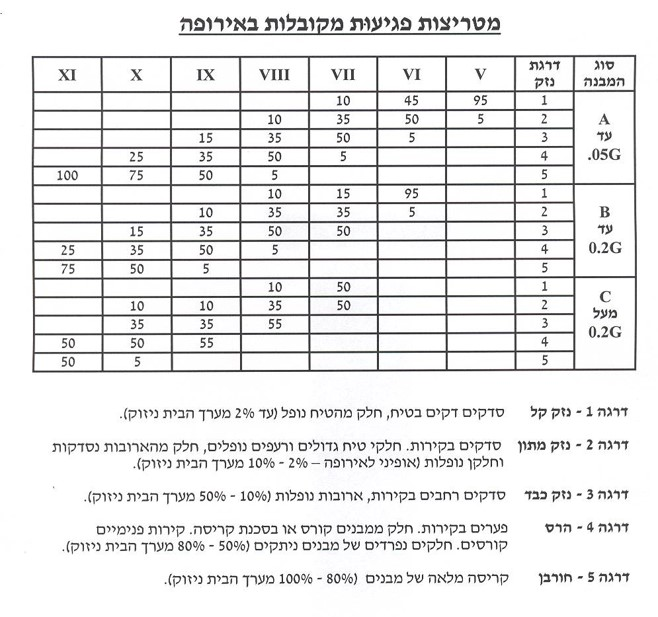 Earthquake's Vulnerability Matrix for Europe